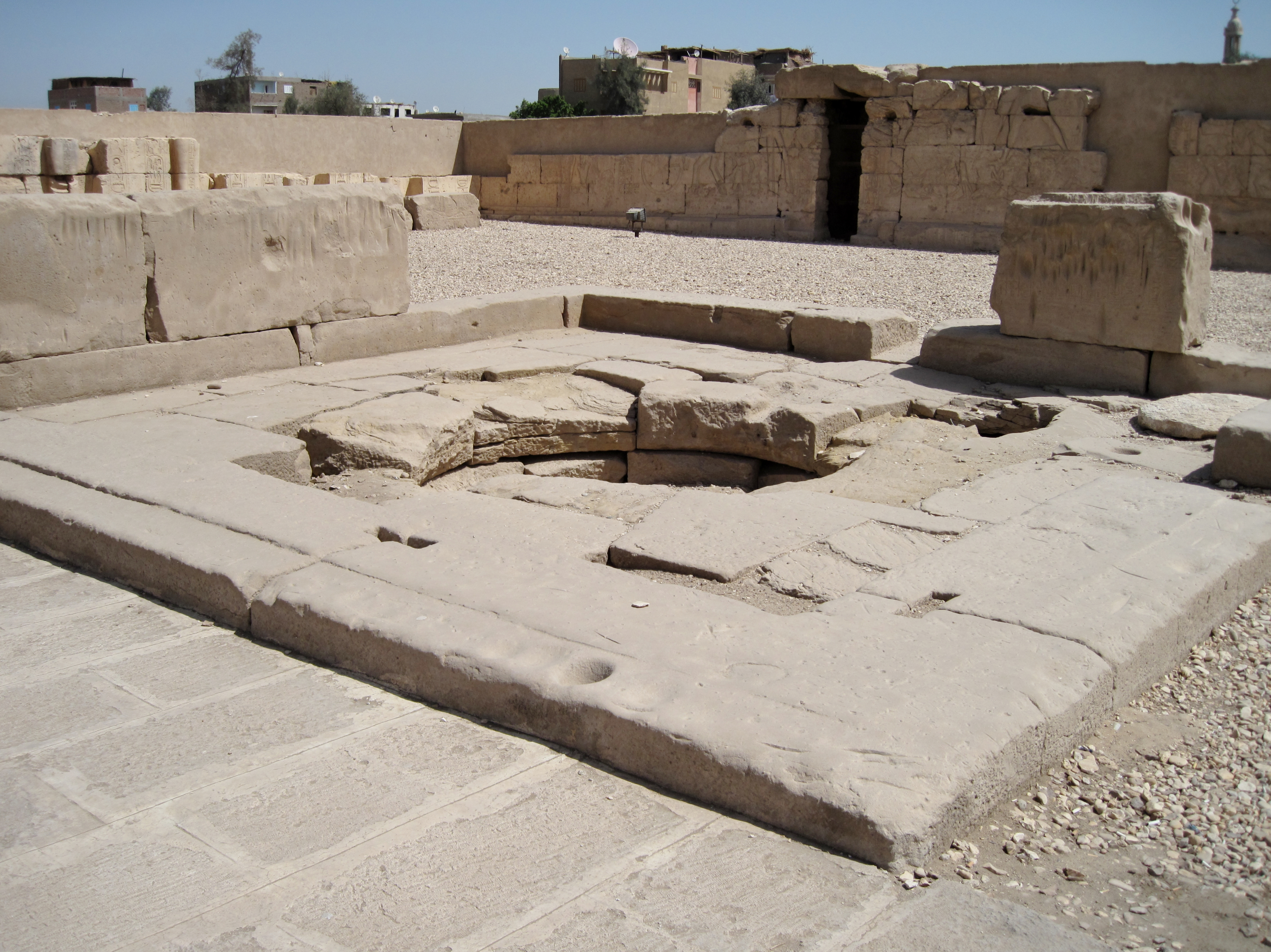 Totentempel Sethos I. in Abydos, Ägypten